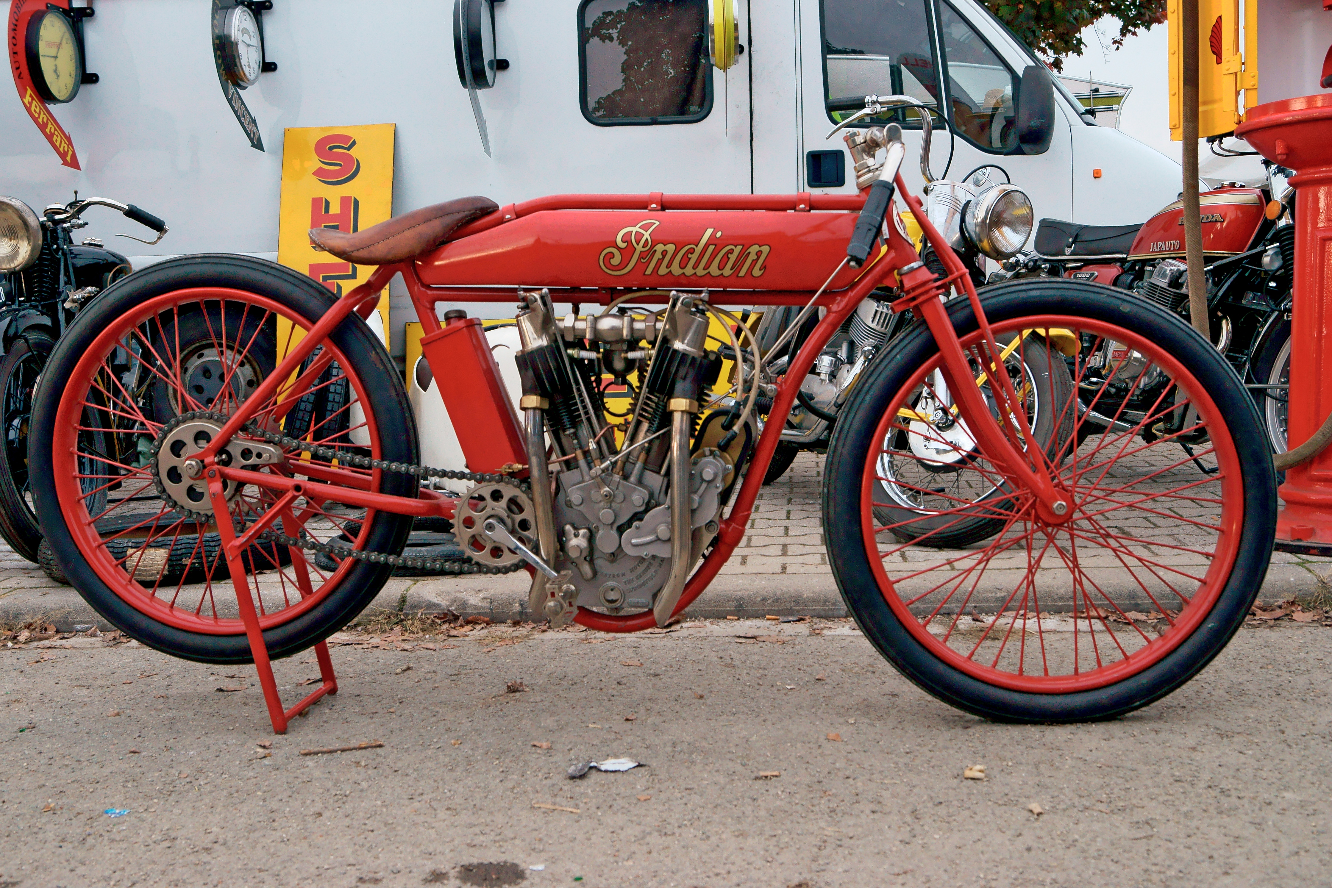 Eine Indian Baujahr 1914 mit einem wechselgesteuertem V2-Motor